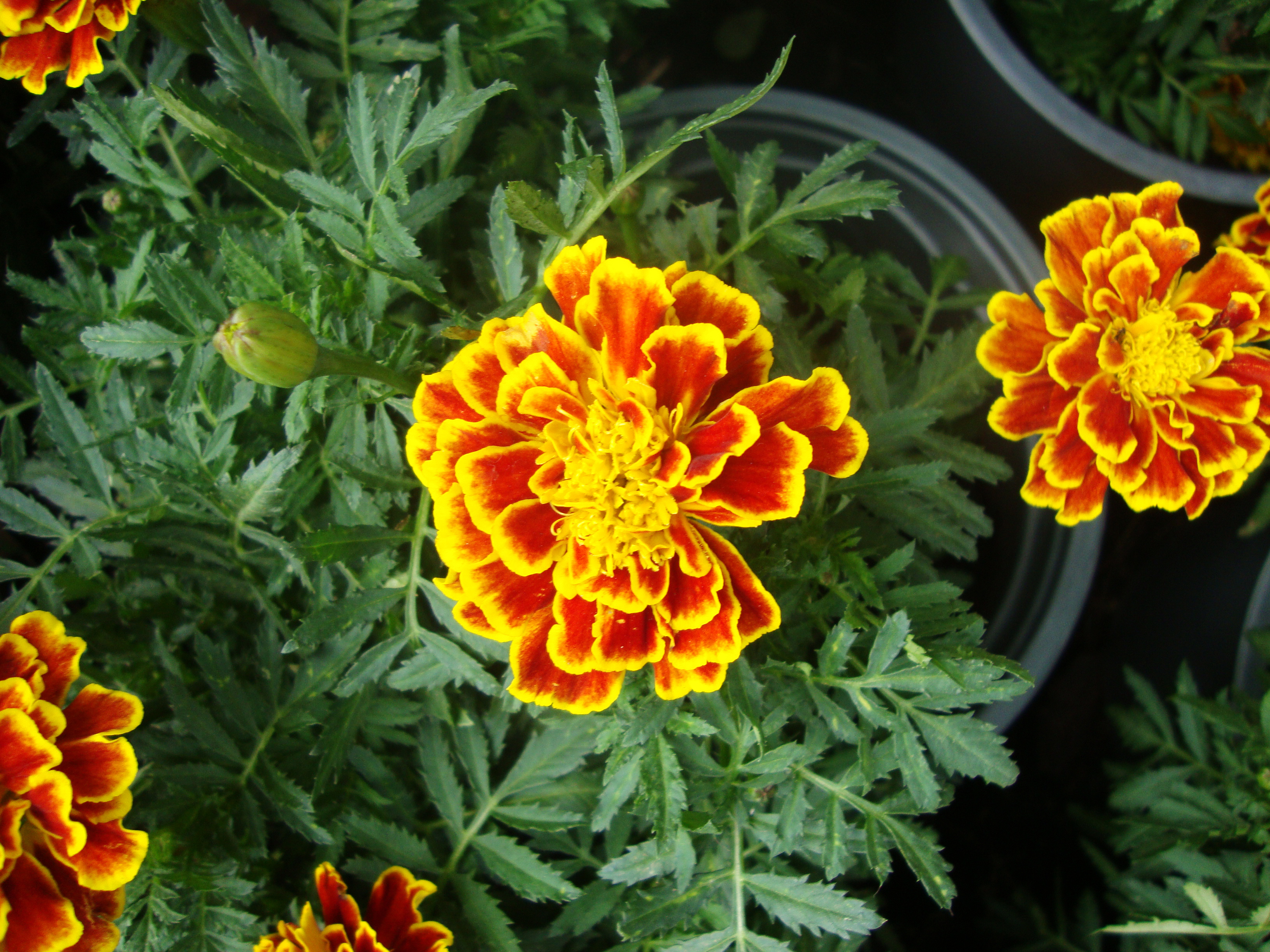 Tagetes patula L., 1753